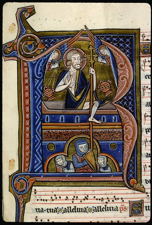 Lettre historiée - Résurrection